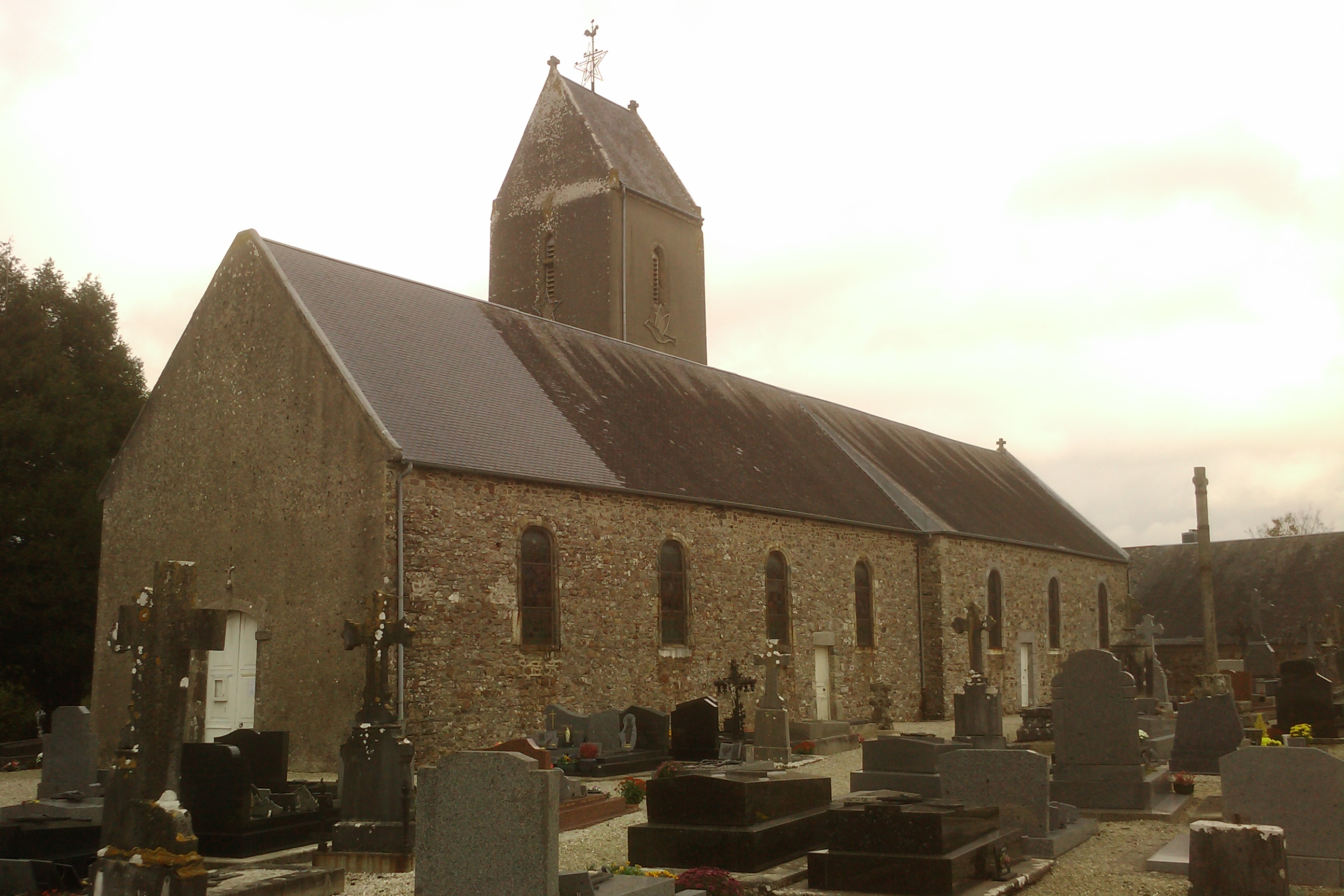 Église d'Ouville